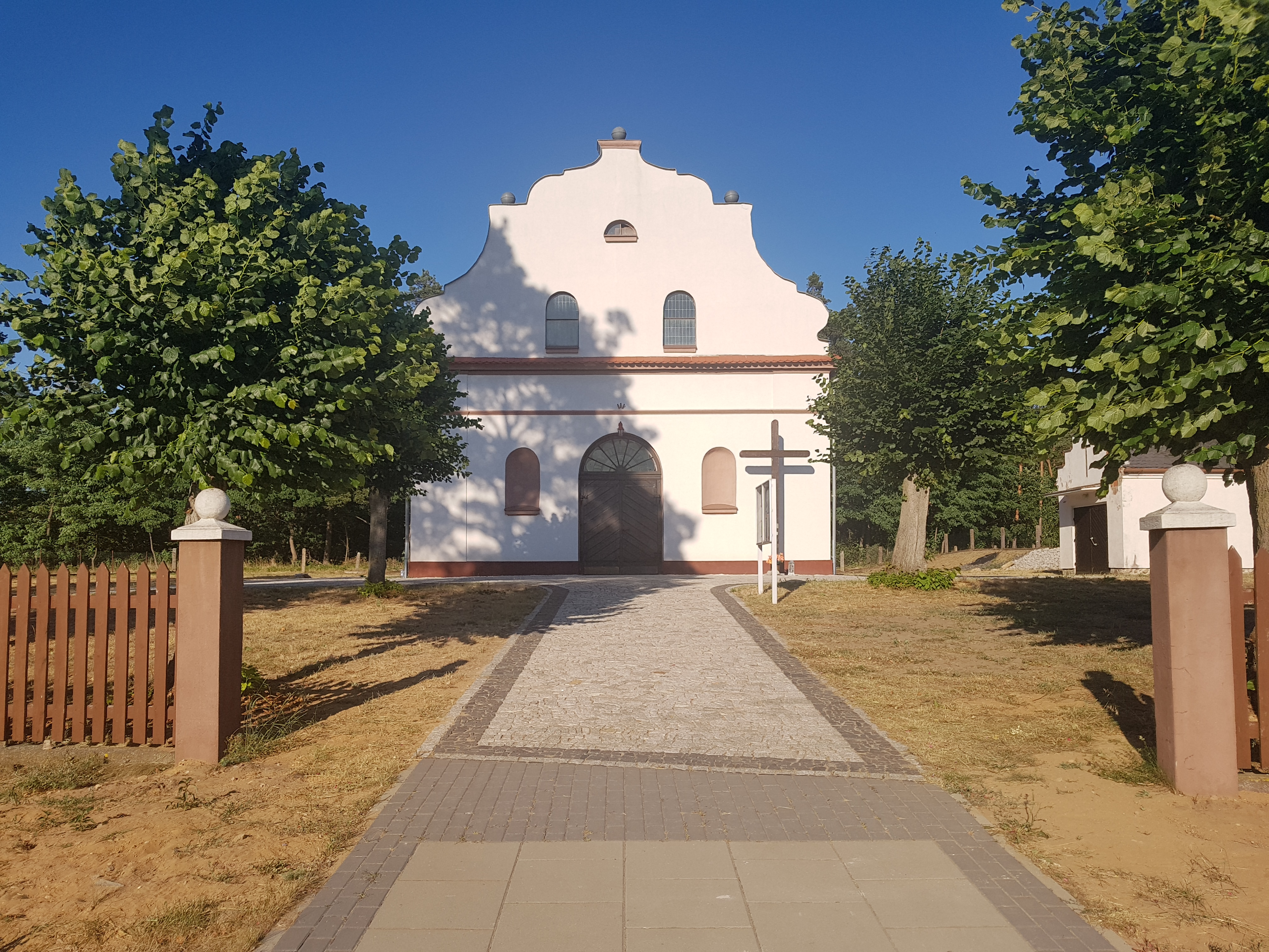 Kościół w Silnej należący do rzymskokatolickiej parafii pw. Św. Józefa